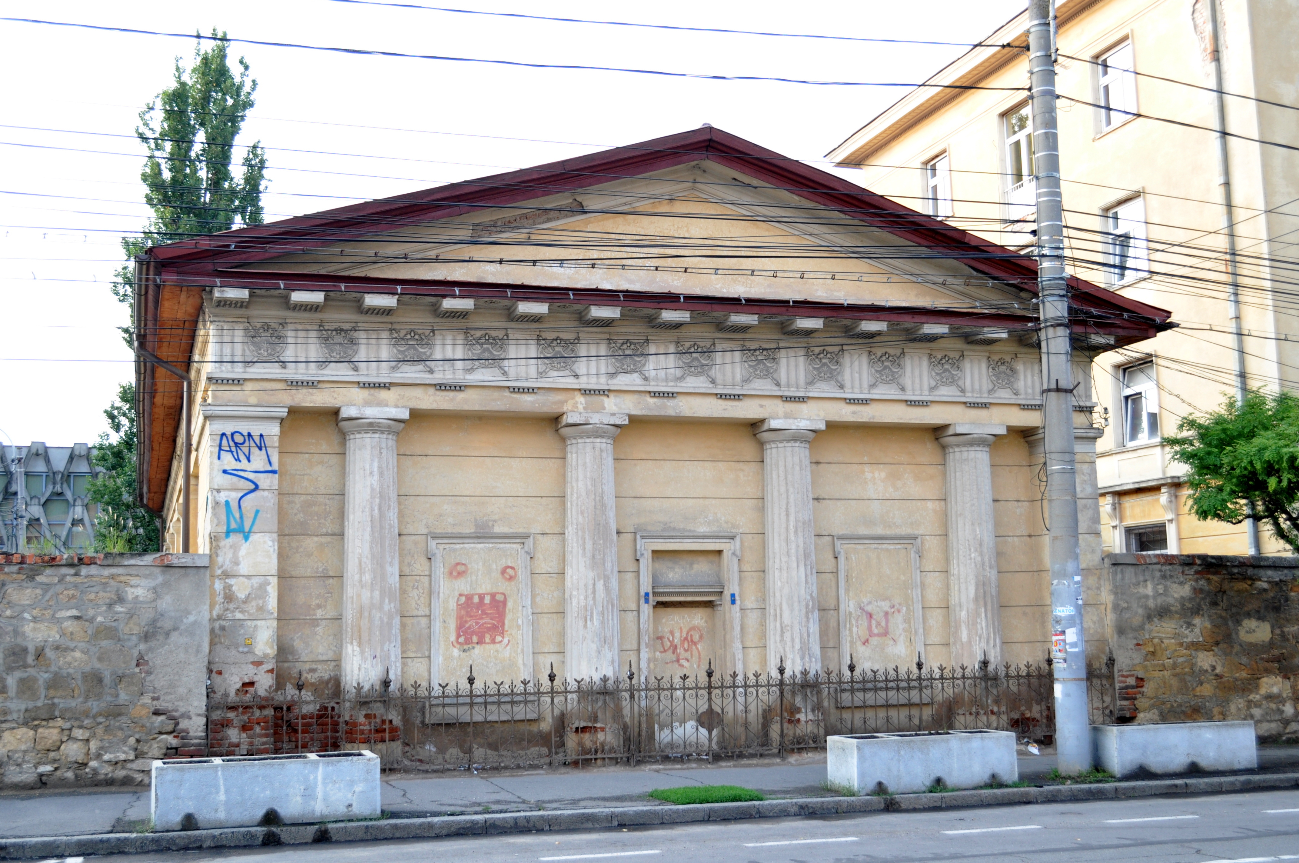 Clădire monument istoric, str. Avram Iancu nr.27-29 (fosta sala de gimnastica a Colegiului Reformat, in stil neoclasic; fronton triunghiular si 4 coloane dorice)